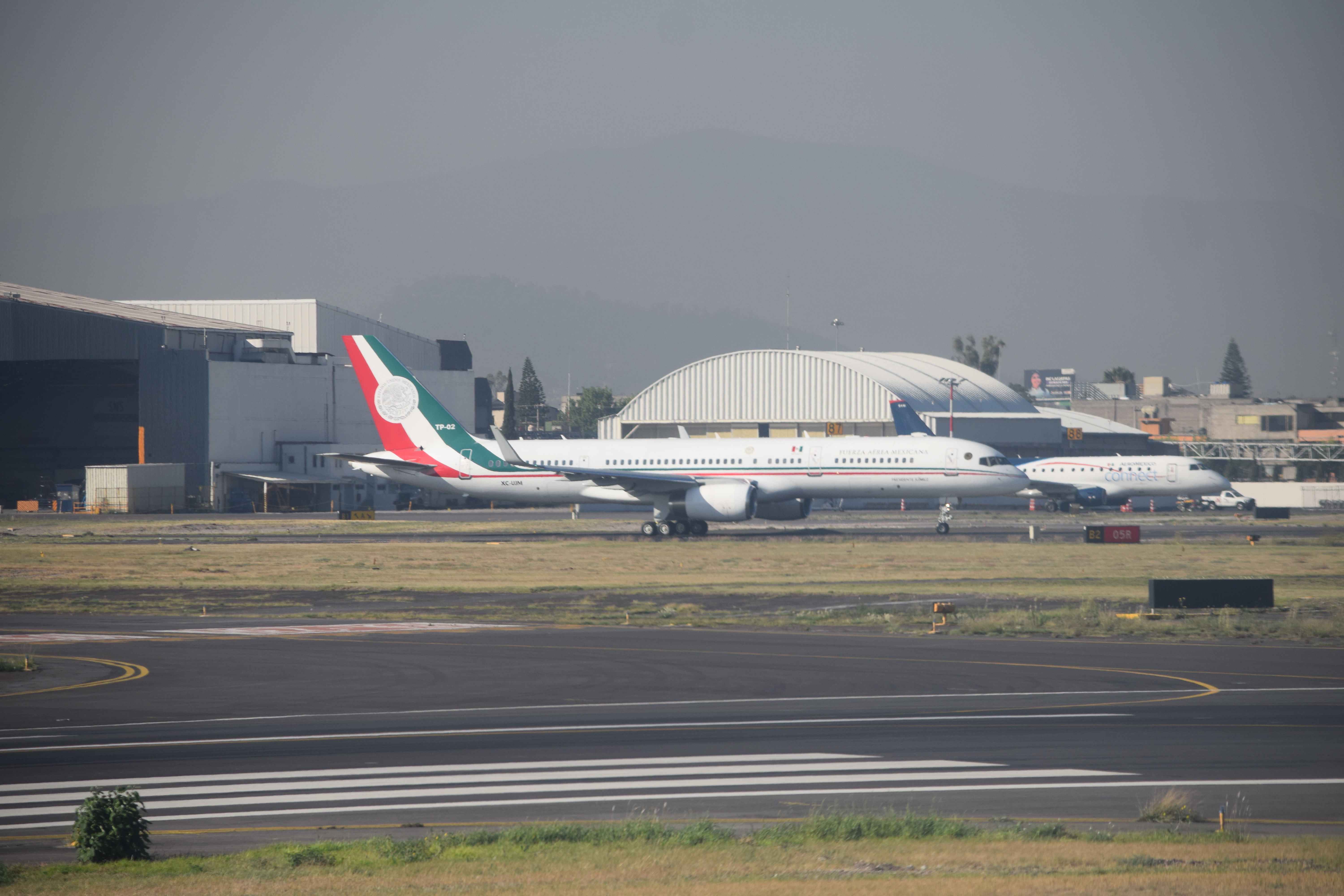 Avión presidencial Benito Juarez